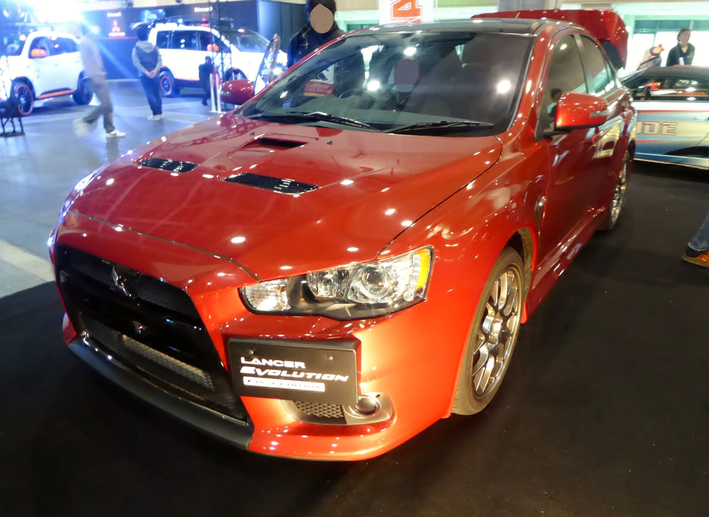 大阪オートメッセ2016においてCBA-CZ4A型三菱・ランサーエボリューションファイナルエディションを撮影。